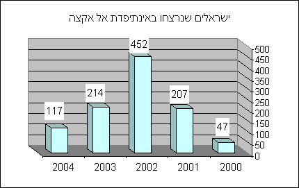 גרף של נרצחי האינתיפדה בארבע שנות עימות מבוסס על נתוני המרכז למורשת המודיעין. נוצר על ידי. רישוי חופשי. --אפי ב. 13:00, 26 נוב' 2004 (UTC)